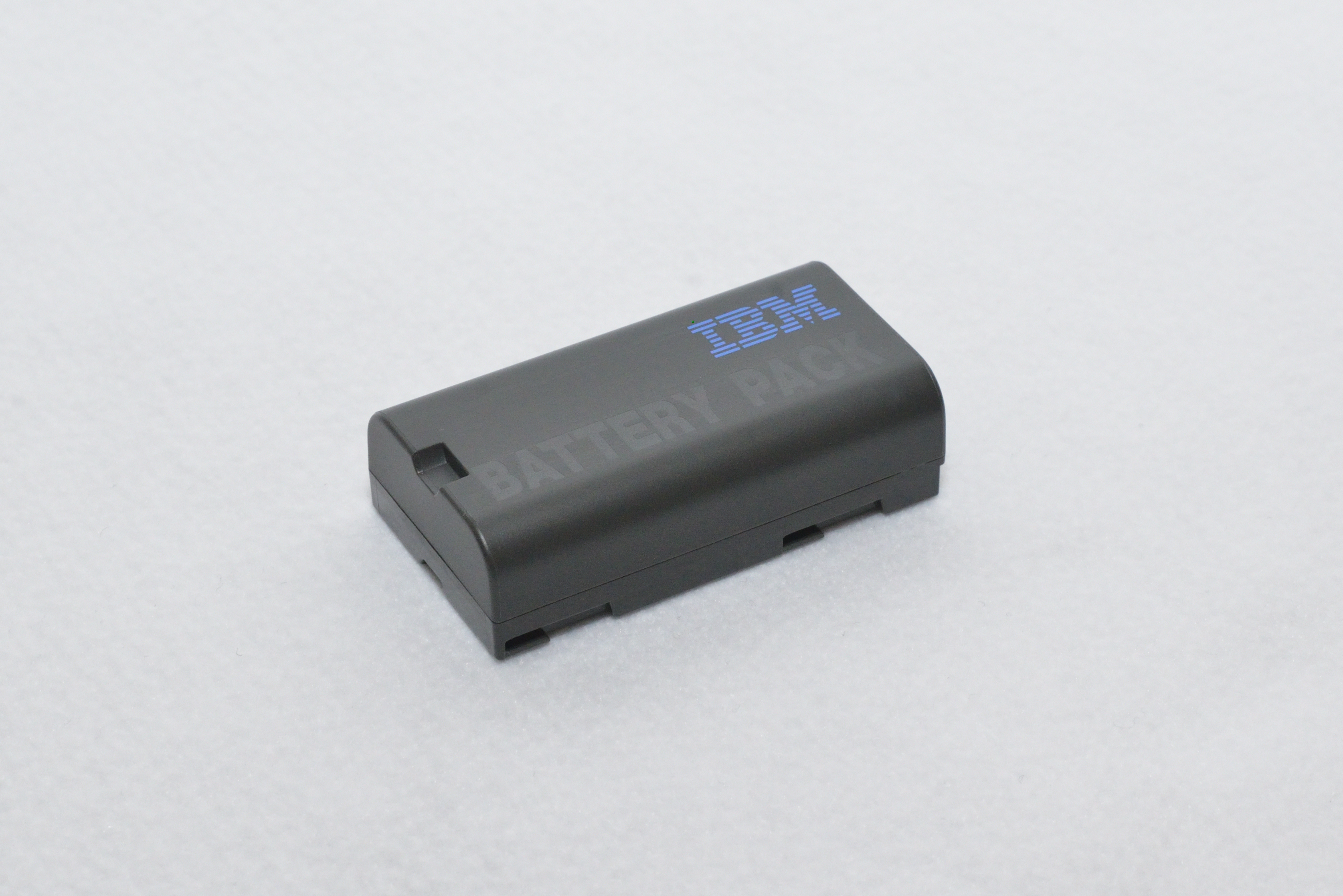 IBM Palm Top PC 110 バッテリー